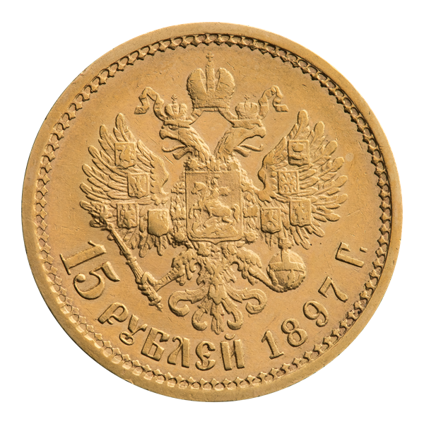 Пятнадцать рублей 1897 г. (реверс). Биткин 347 (R4). Двуглавый орёл с распростёртыми крыльями под тремя коронами; из верхней короны спускается развевающаяся Андреевская лента; на груди орла щит с гербом Москвы, окружённый цепью ордена св. Андрея Первозванного. На крыльях орла щиты с гербами Царства Казанского, Царства Польского, Царства Херсонеса Таврического, соединённый герб Великих княжеств Киевского, Владимирского и Новгородского, Царства Астраханского, Царства Сибирского, Царства Грузинского и Княжества Финляндского. Круговая надпись: 15 РУБЛЕЙ 1897 Г. Зубчатый ободок по краю.